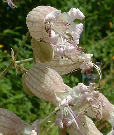 Silène enflée, Bucey-lès-Gy juin2004